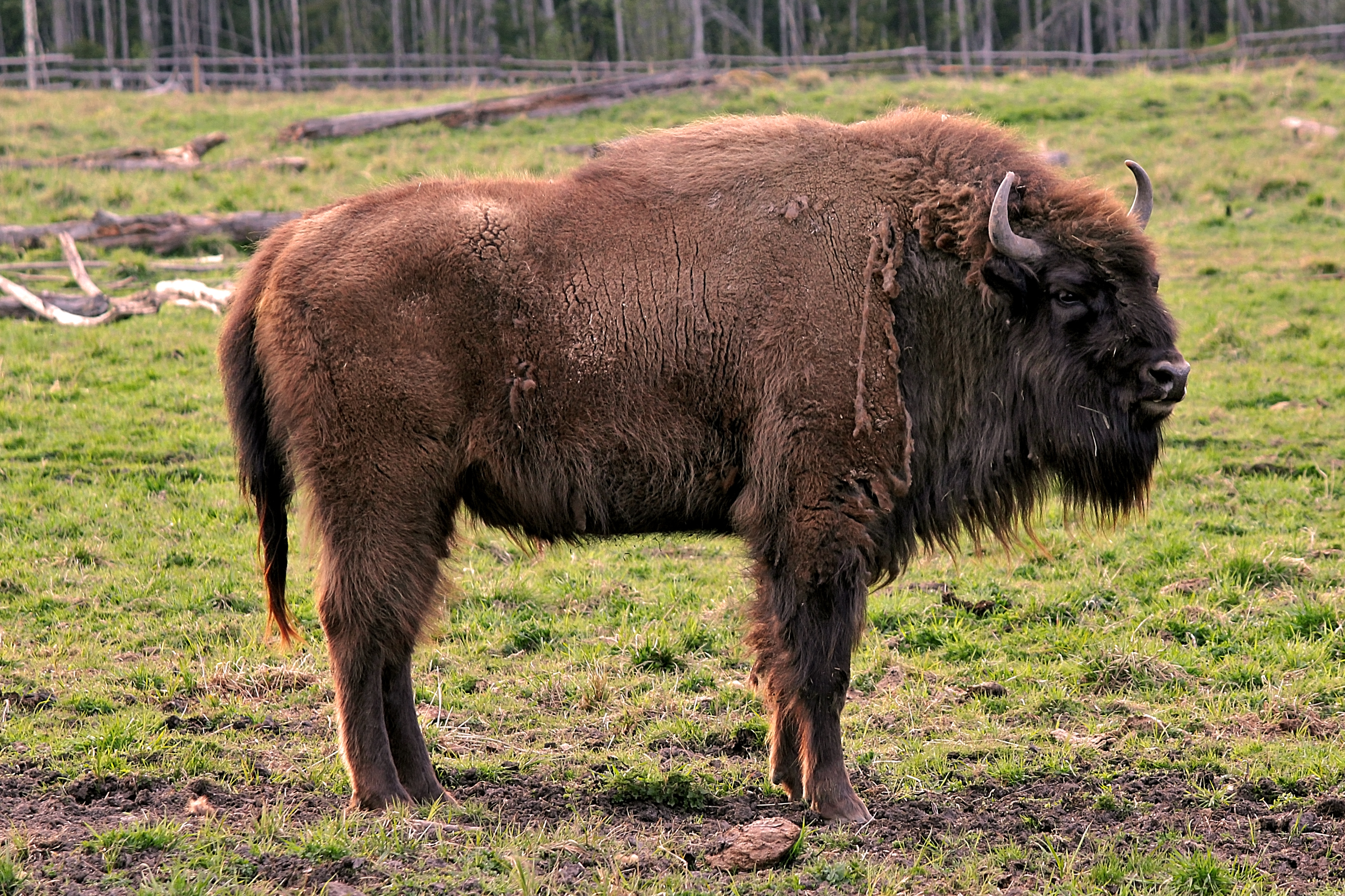 Visent (Bison bonasus) i Avesta visentpark